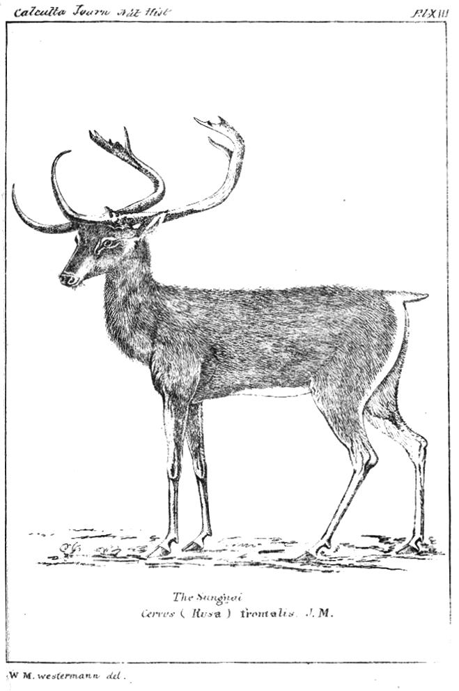 Cervus eldii